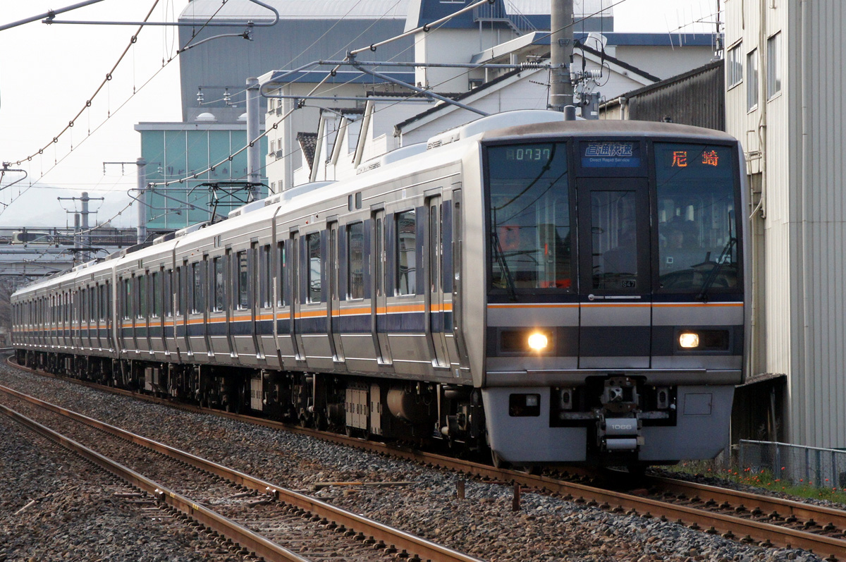 JR西日本207系（大和路線）